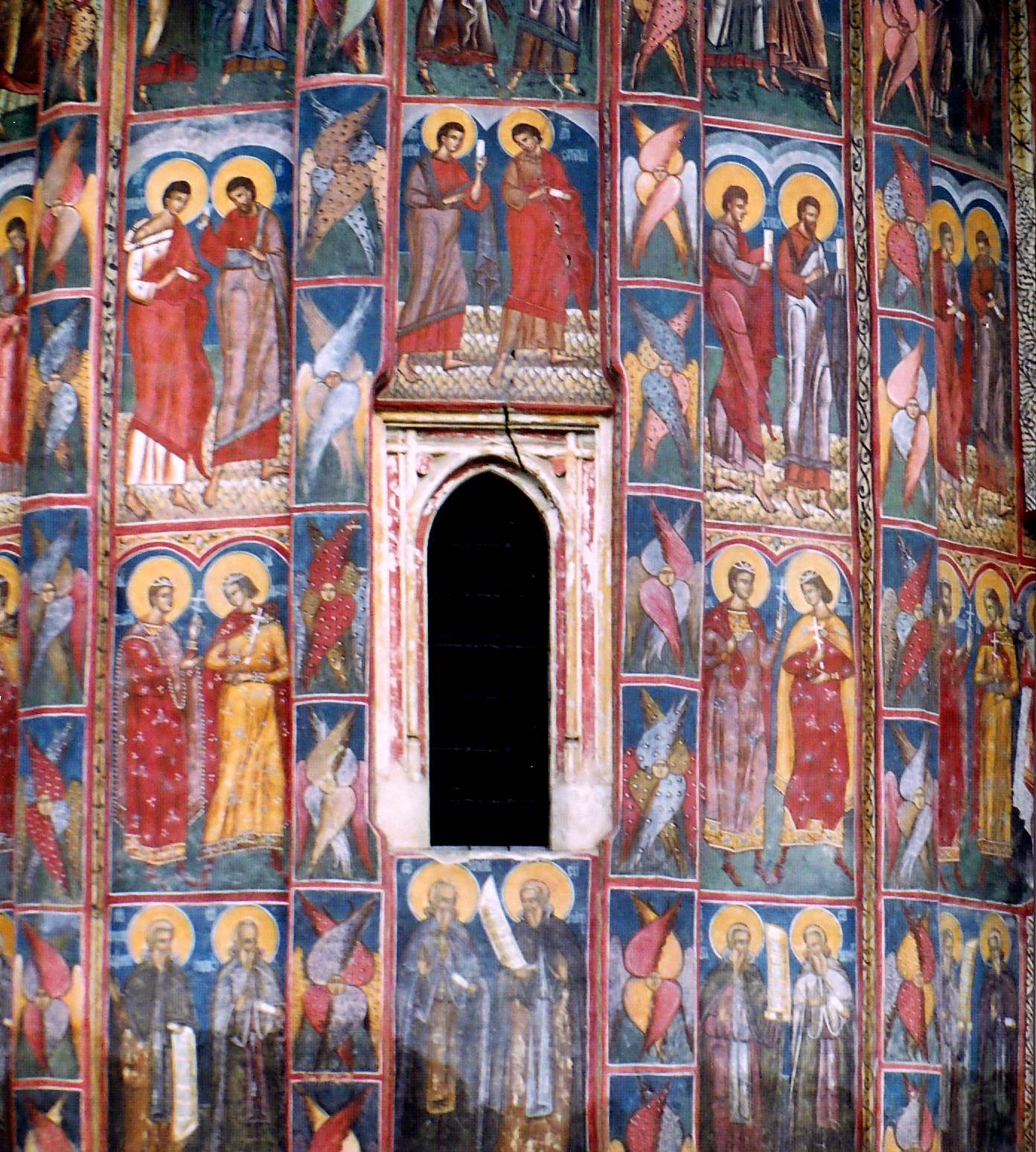 Voronet, Románia: külső falkép a templom keleti apszisáról.